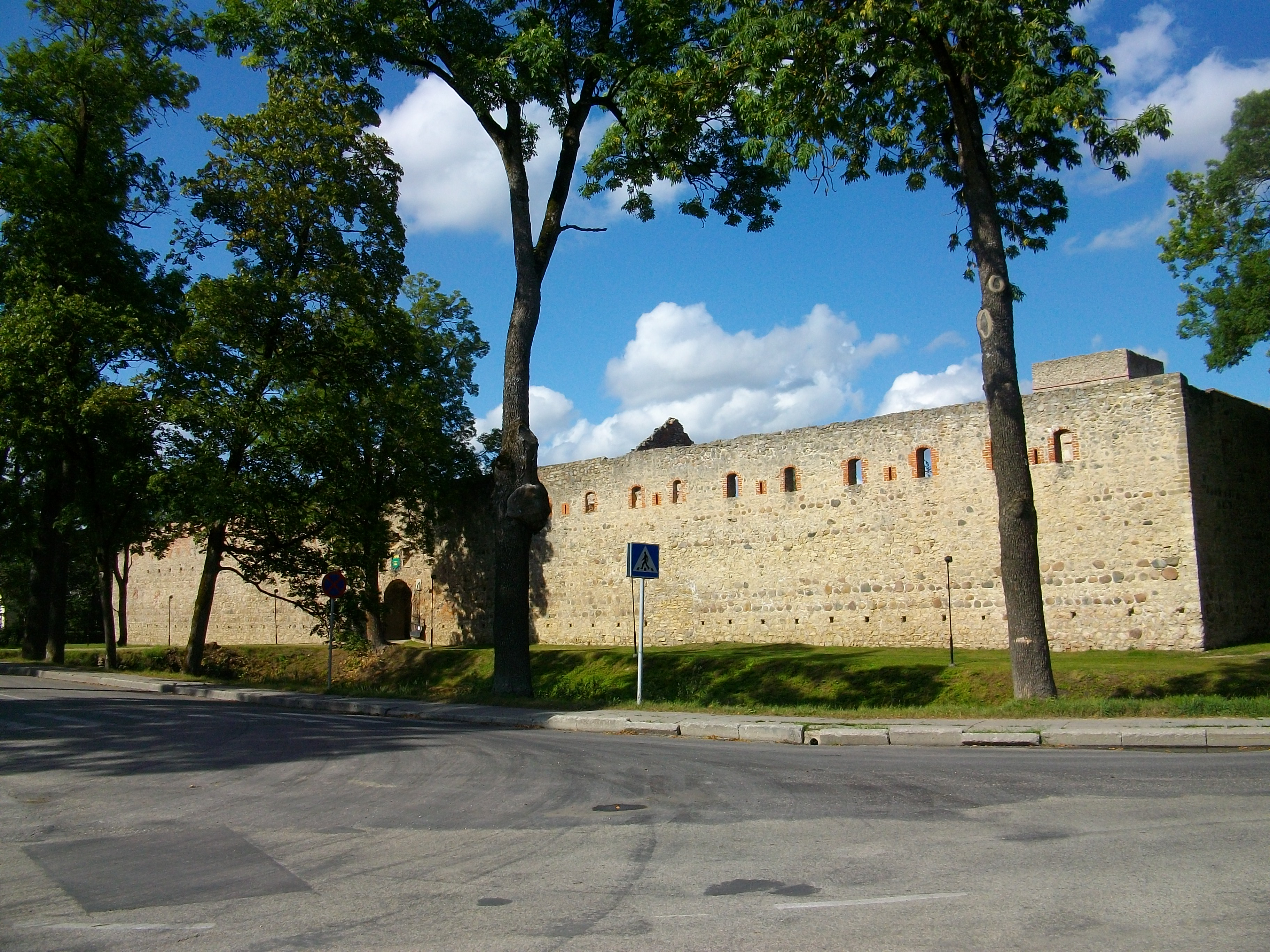 Põltsamaa linnuse varemed vallikraaviga